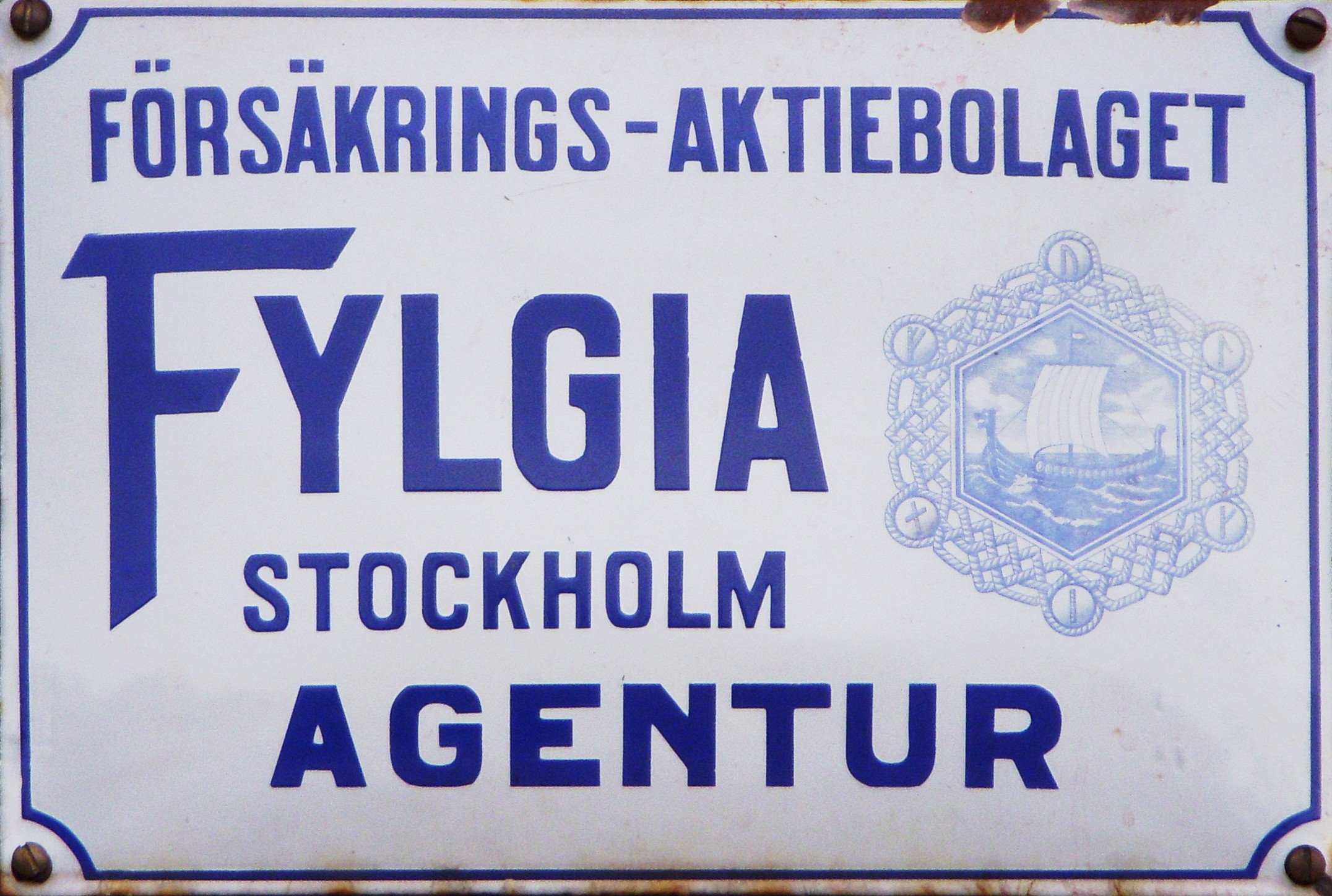 Fylgia försäkring skylt på Läggesta Nedre station